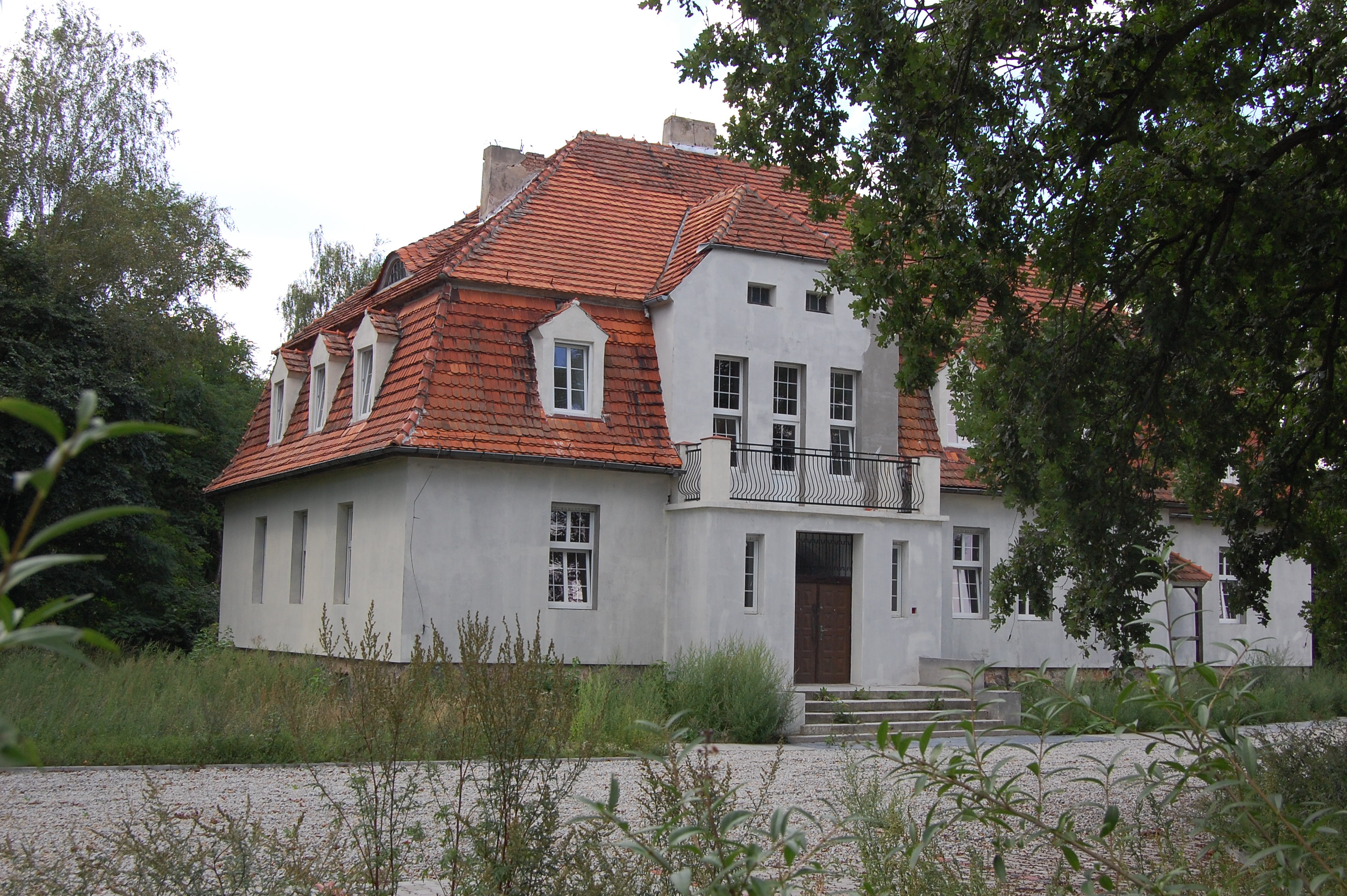 Dwór w miejscowości Skąpe (powiat słupecki) z 1910 r.